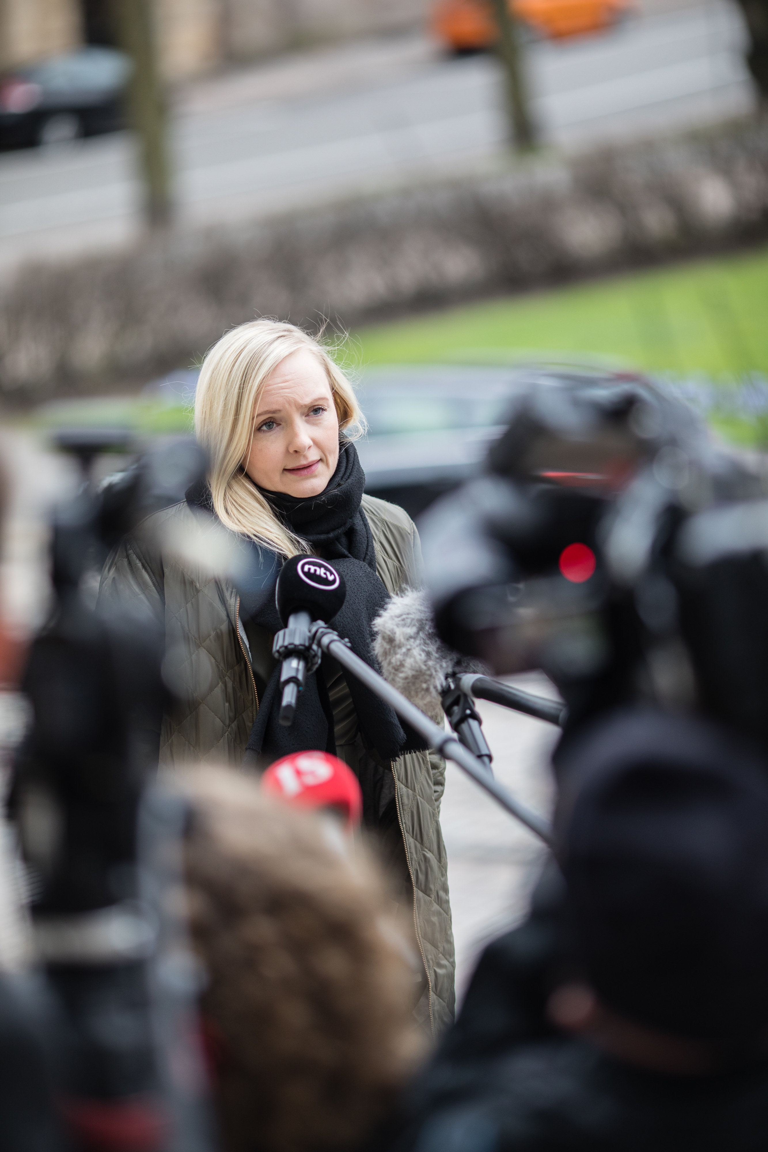 © Laura Kotila | valtioneuvoston kanslia